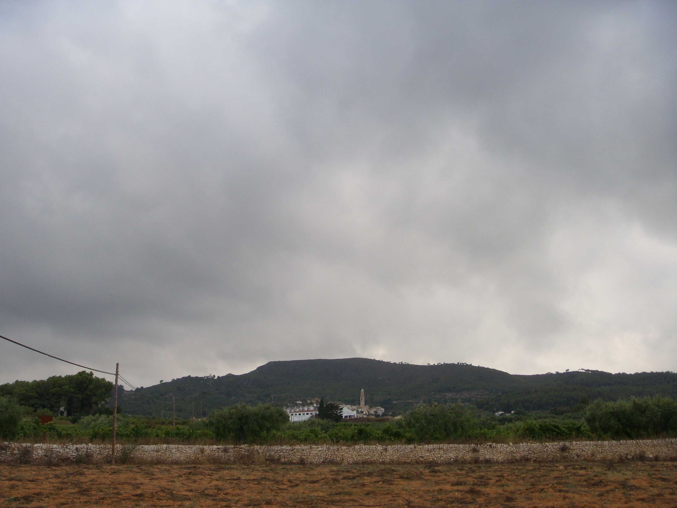 Albinyana, a la falda de la Costa del Rovira, vist des d'una vinya.